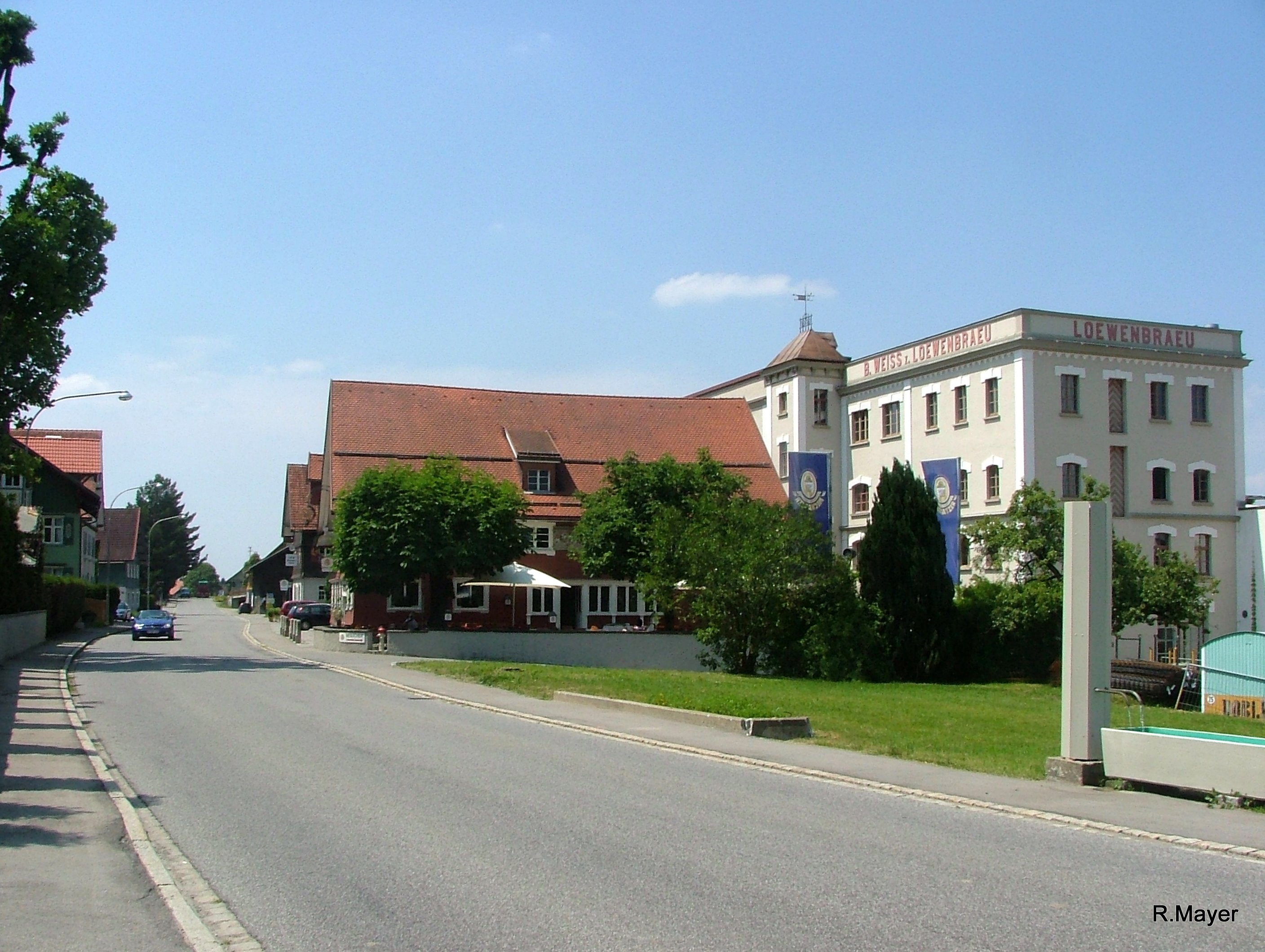 Meckatz